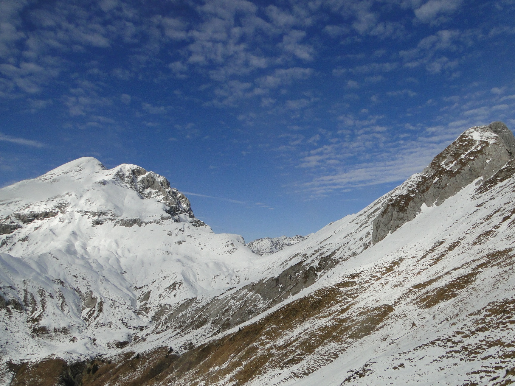 Pizzo Arera e cima di Valmora, Prealpi bergamasche (BG)